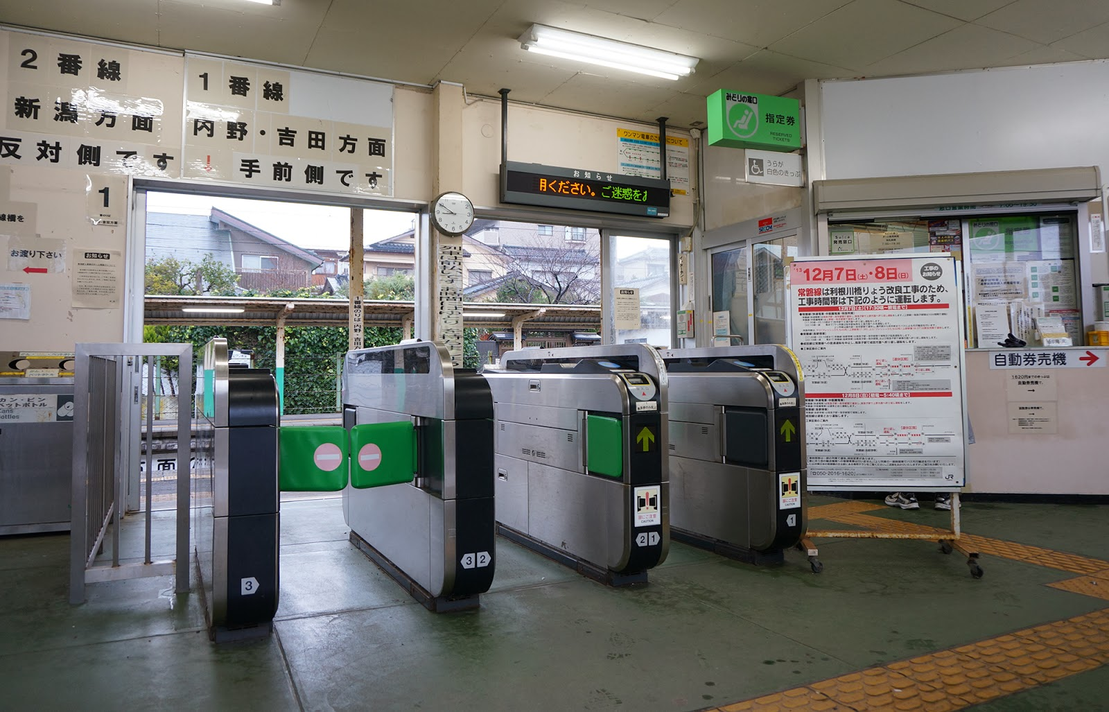 南口改札（2013年12月）